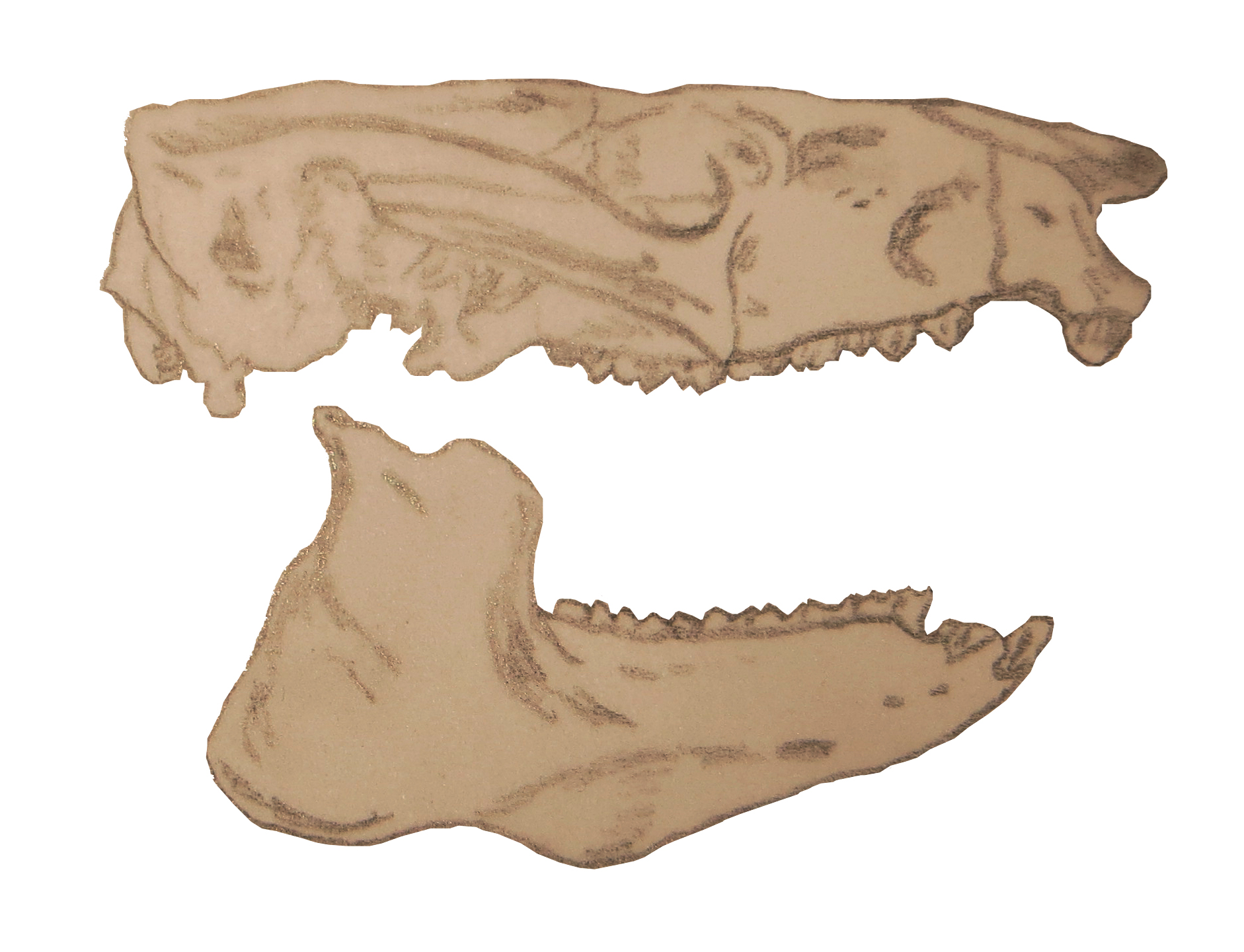 Skull of Cochilius